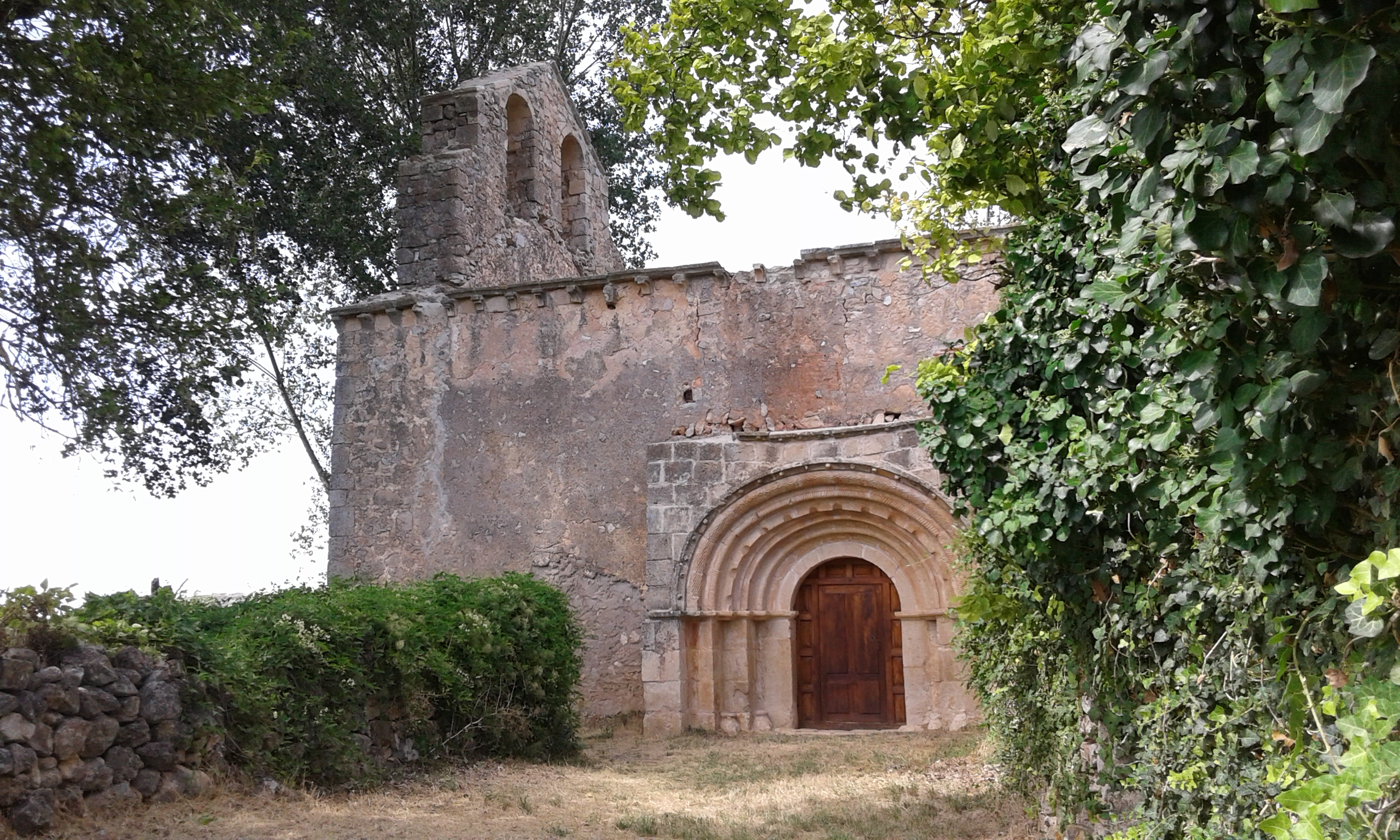 Ermita medieval de Nuestra Señora de la Calzada, antigua parroquia del pueblo.